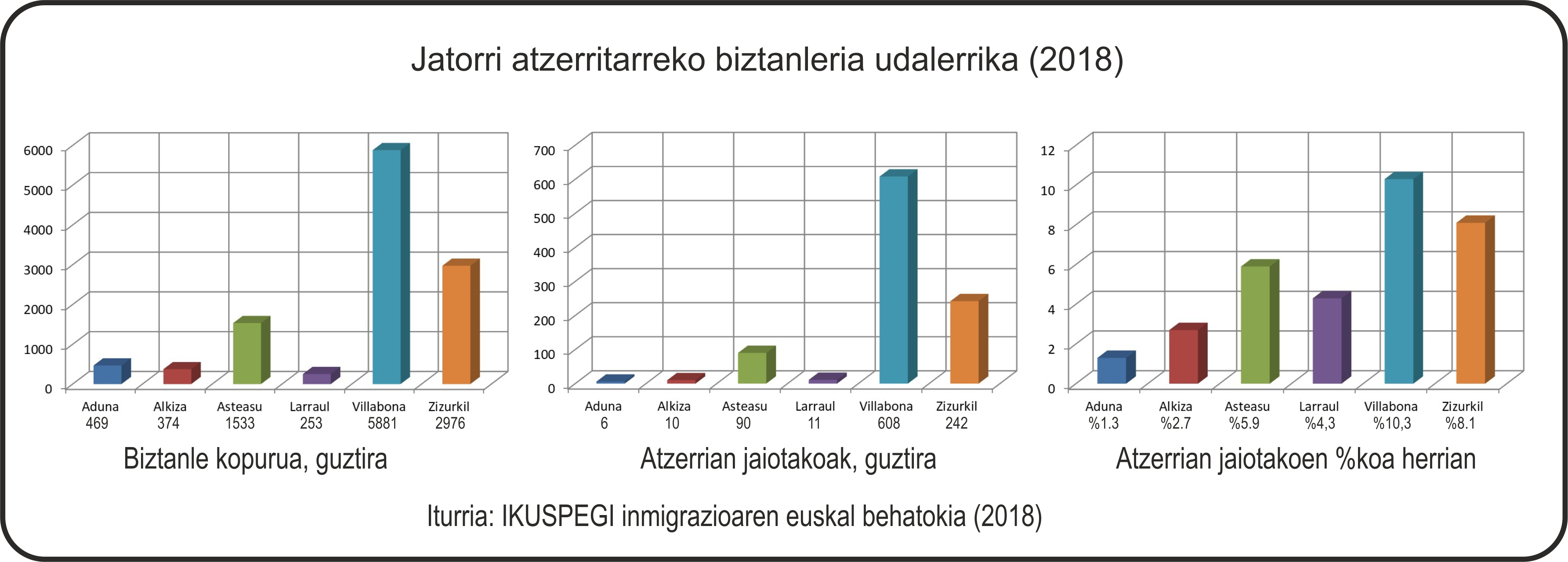 Villabona-Aiztondoko biztaleria atzerritarra